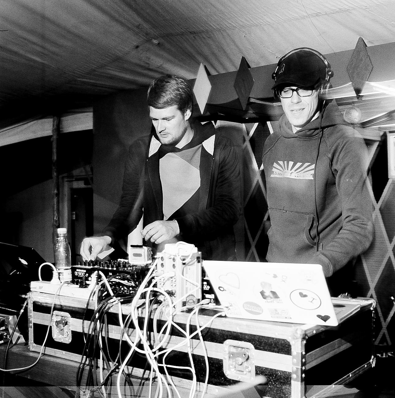 Fotograf : Mathias Stoffersen Kollektiv Turmstrasse